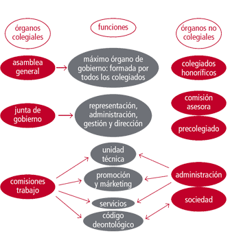 Estructura Organizativa del COIQCV